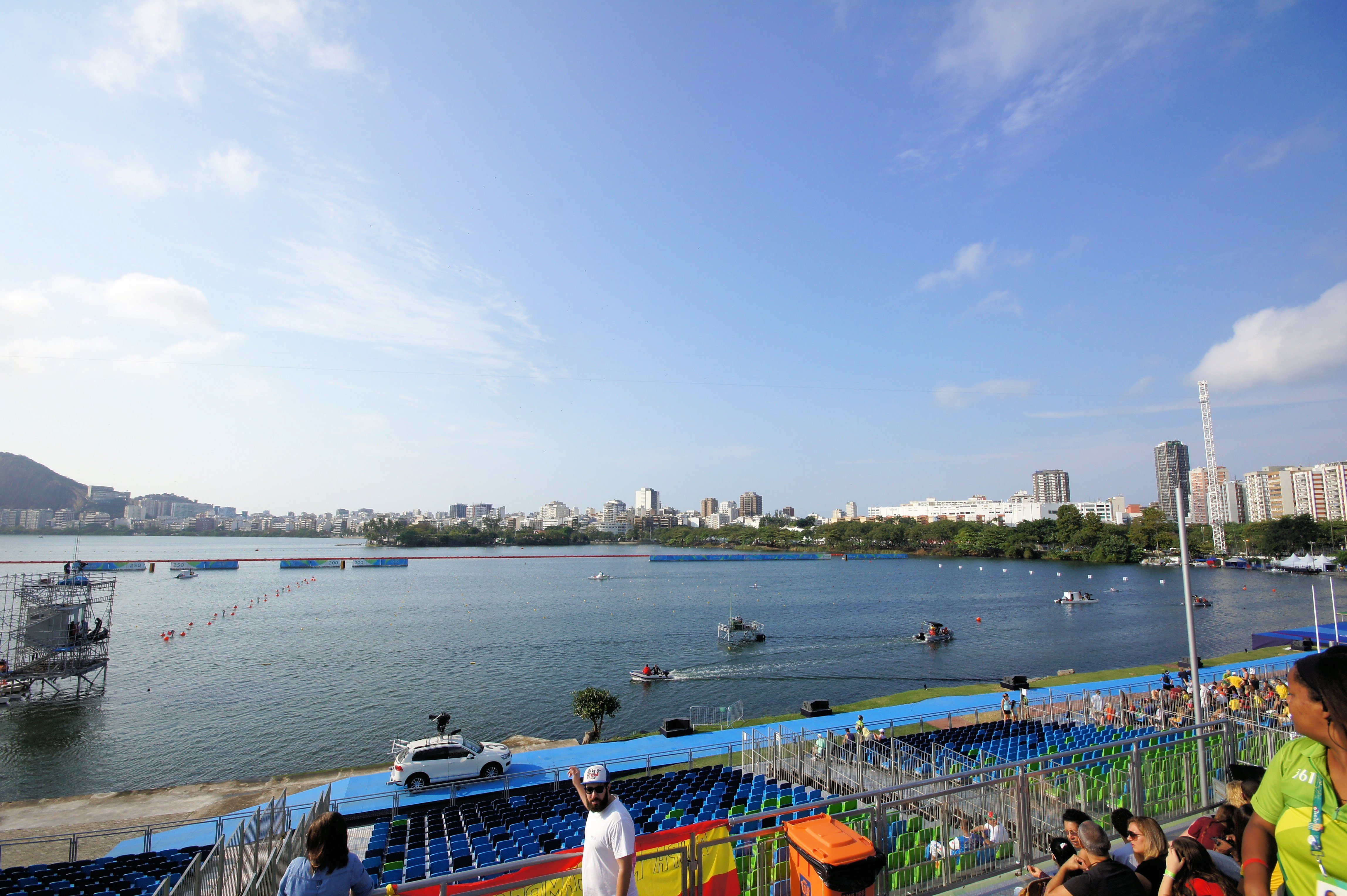 Rio 2016. Canoagem de velocidade/Canoe sprint.